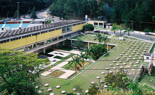 Balneario de Aguas de Lindoia, Sao Paulo, Brasil. Projeto do arquiteto Oswaldo Bratke. Arquitetura moderna